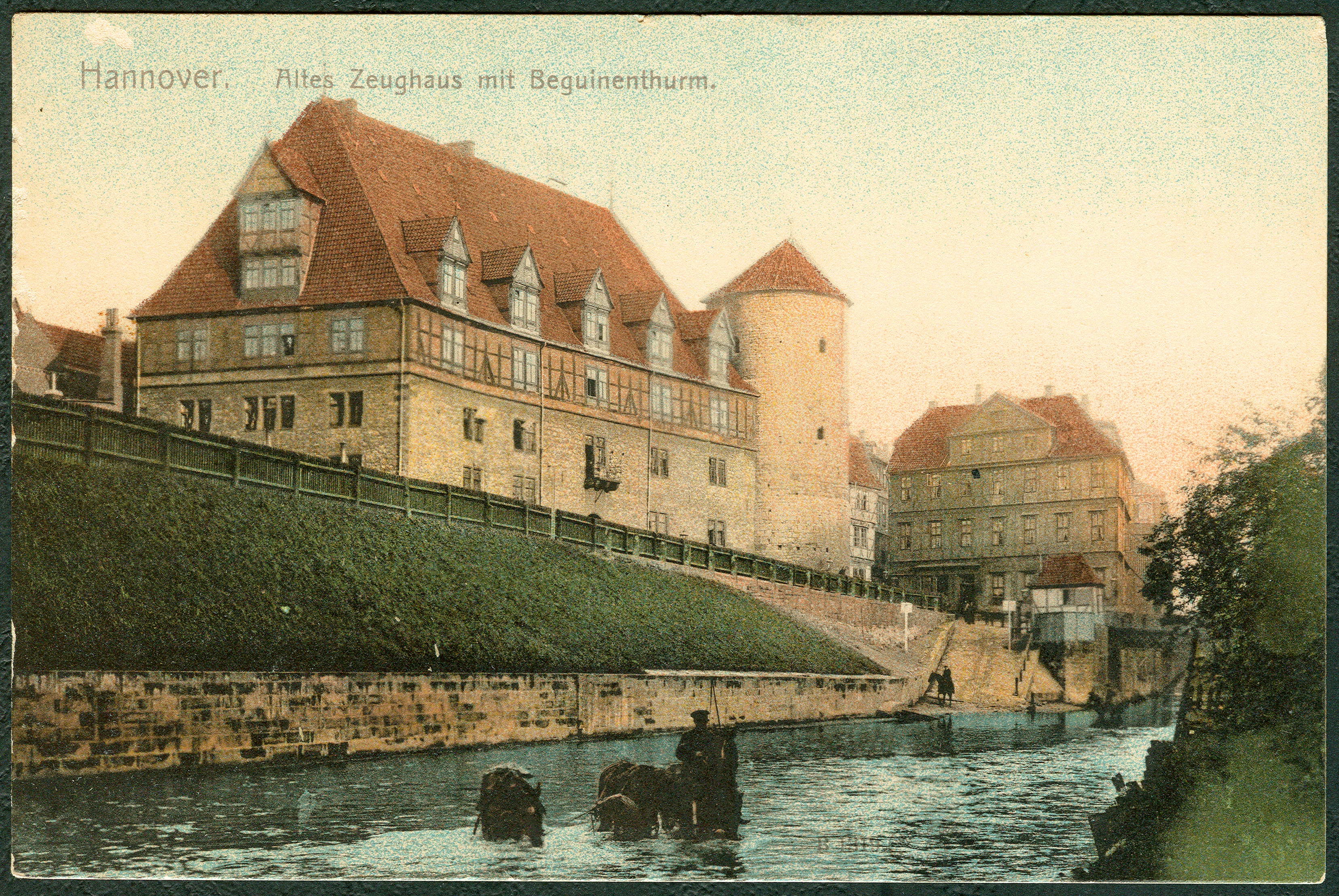 Hannover um 1900, Blick vom Ufer der Leine über die Pferdeschwemme in Richtung Zeughaus am Hohen Ufer und den Beginenturm; in der Bildmitte tränkt ein Mann mitten im Fluss drei Pferde, weiter hinten sind zwei weitere Reiter zu erkennen ... Mehrfarbig kolorierte Ansichtskarte Nummer B 1319" als Lithografie über Lichtdruck mit großer Präzision der Dresdner Kunstdruckerei Wilhelm Hoffmann AG ...